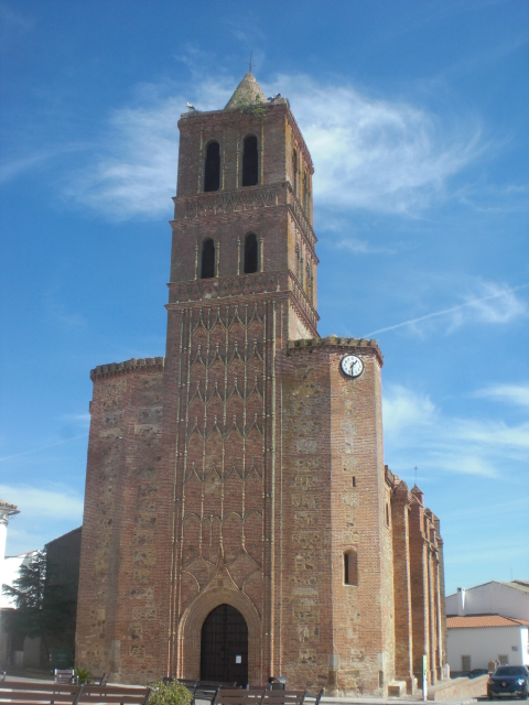 Turo de la pregxejo de Granja de Torrehermosa